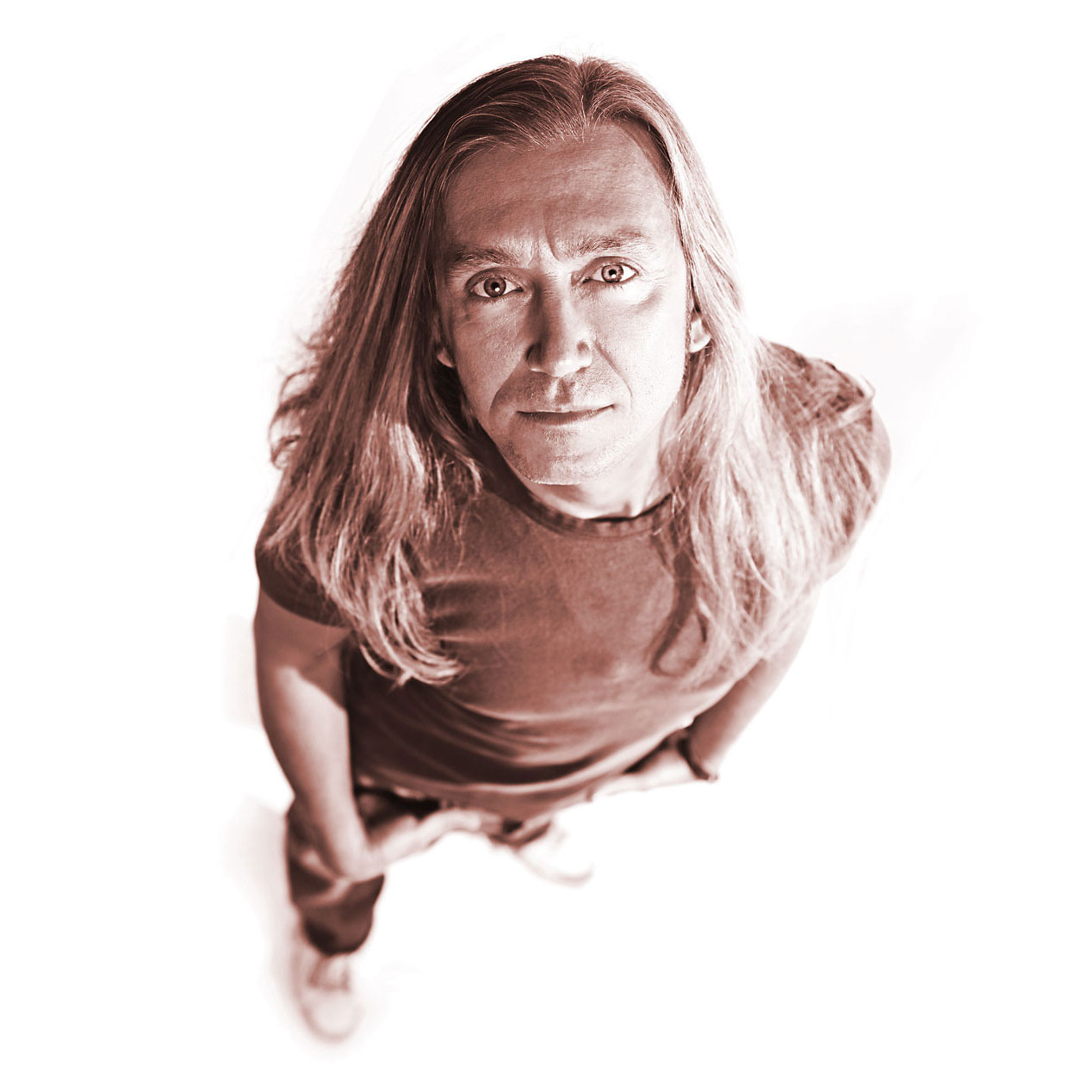 B-Joe